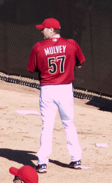 Kevin Mulvey